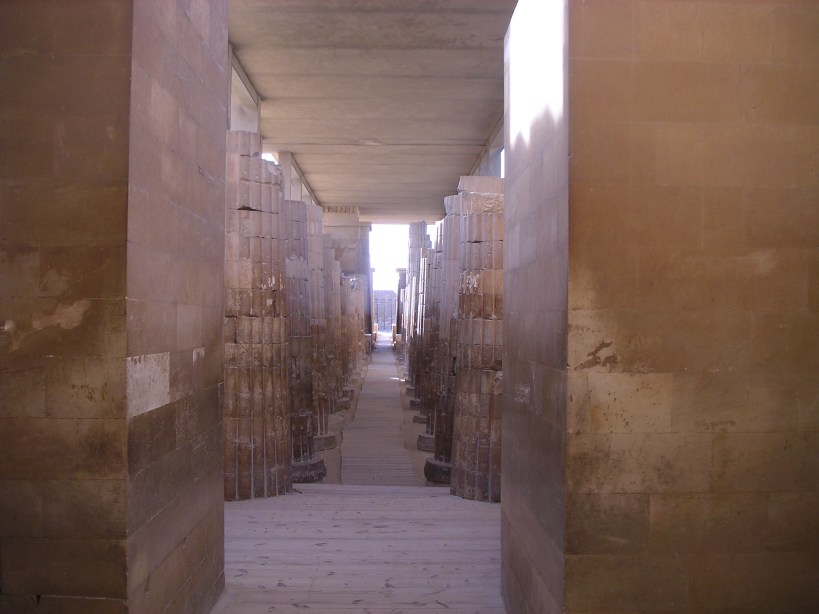 Corridor à colonnade du complexe funéraire de Djéser à Saqqarah - IIIe dynastie égyptienne